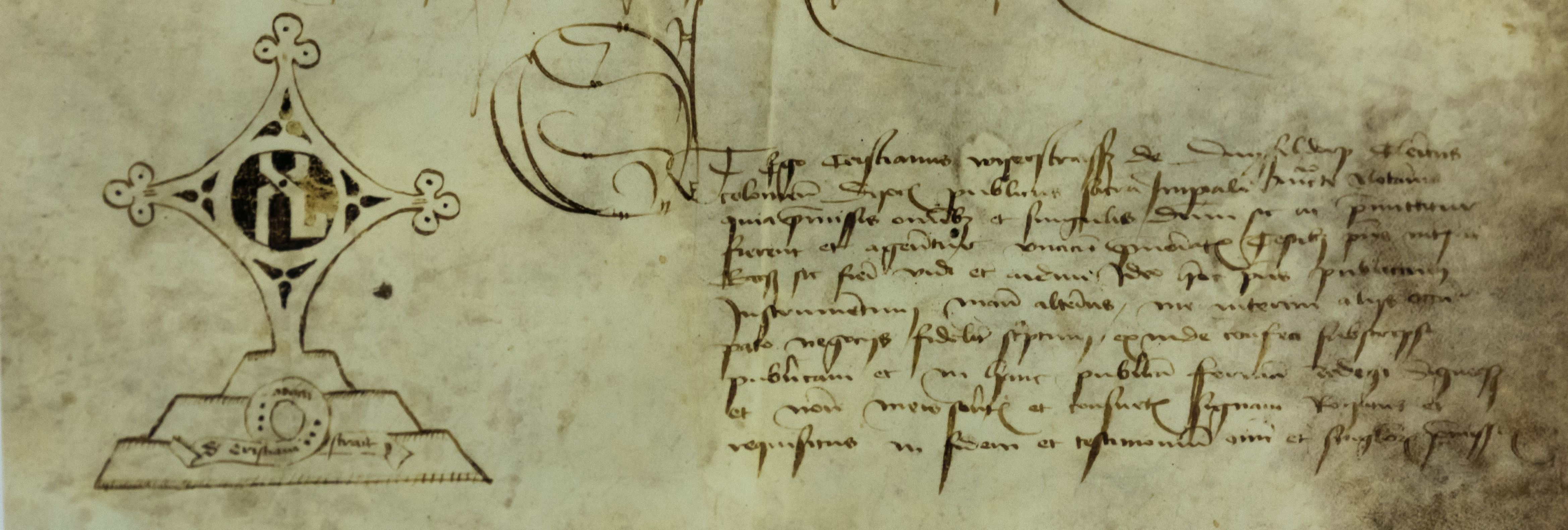 Notariatszeichen des Christian Wierstraet an einer Urkunde 1469